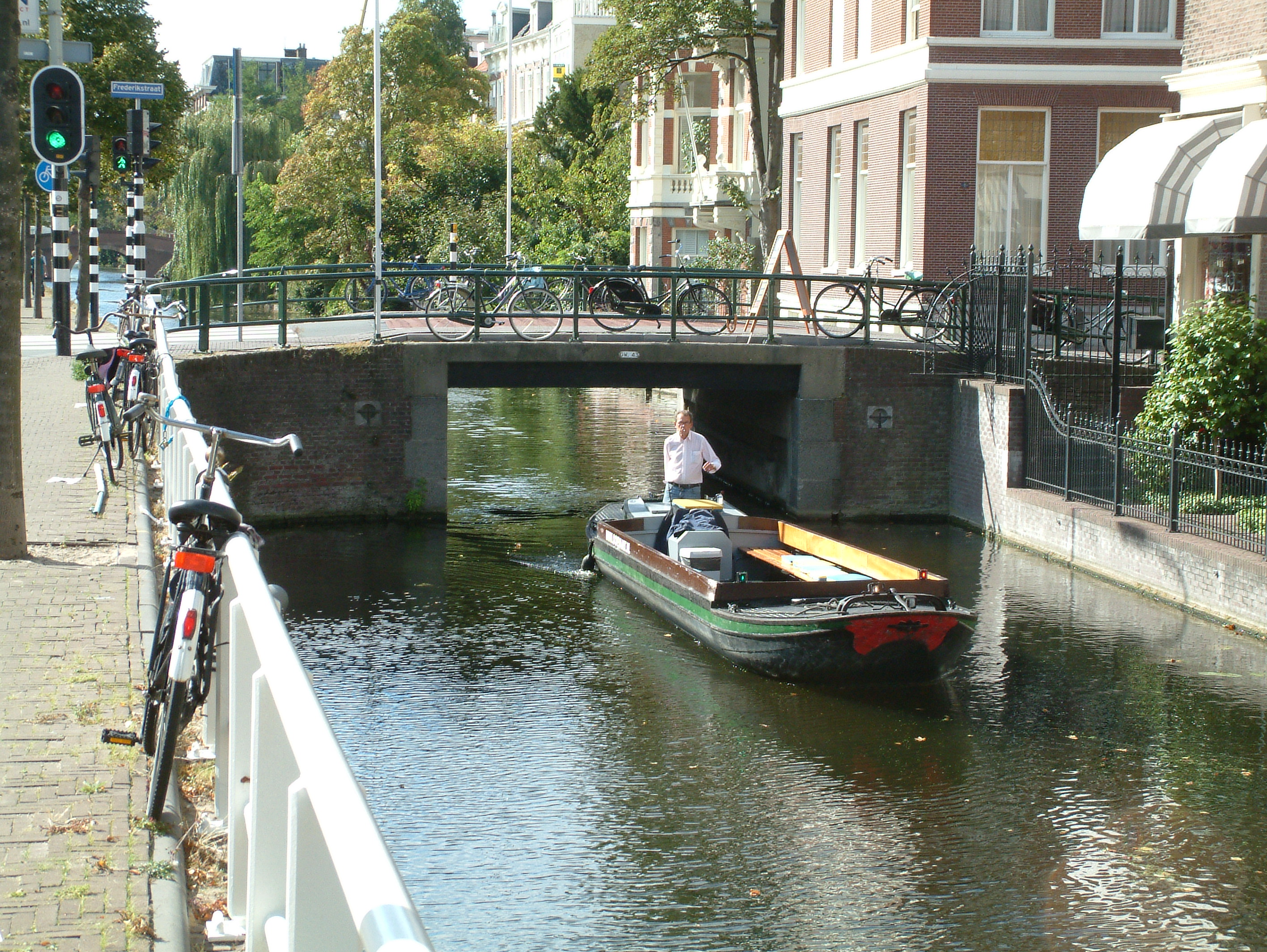 Brug in Den Haag